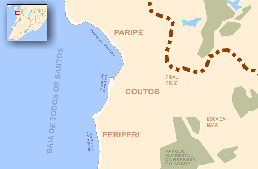 Mapa de Salvador (Bahia, Brazil) - Praias: Periperi, Setúbal e Paripe.